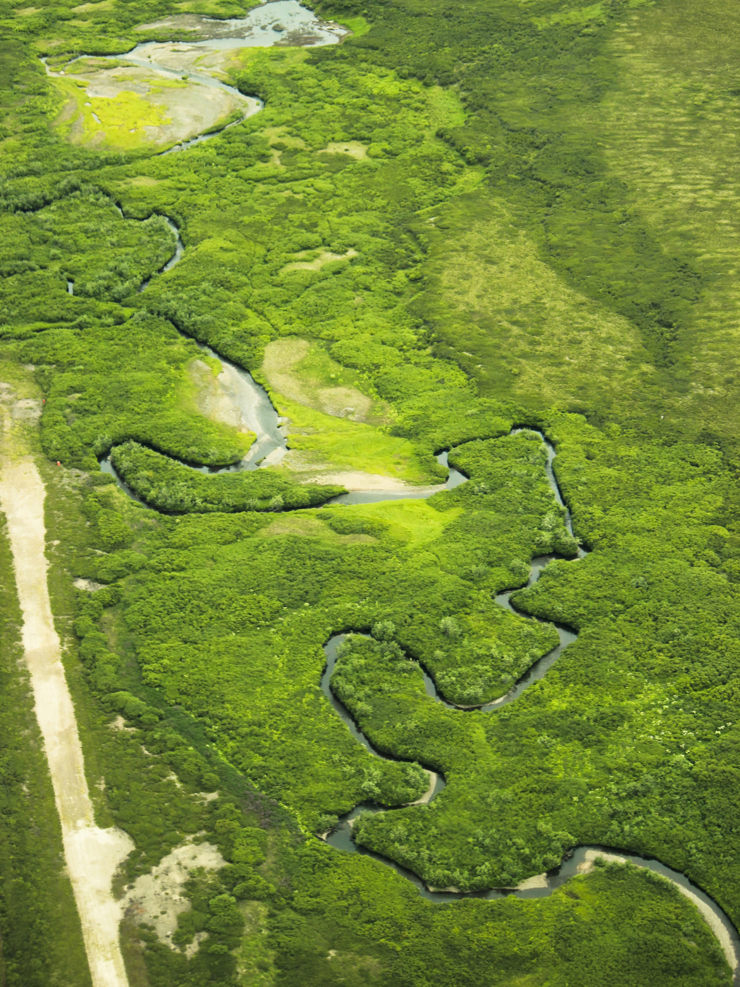 Serpentine River- Katie Cullen 133 edit resize